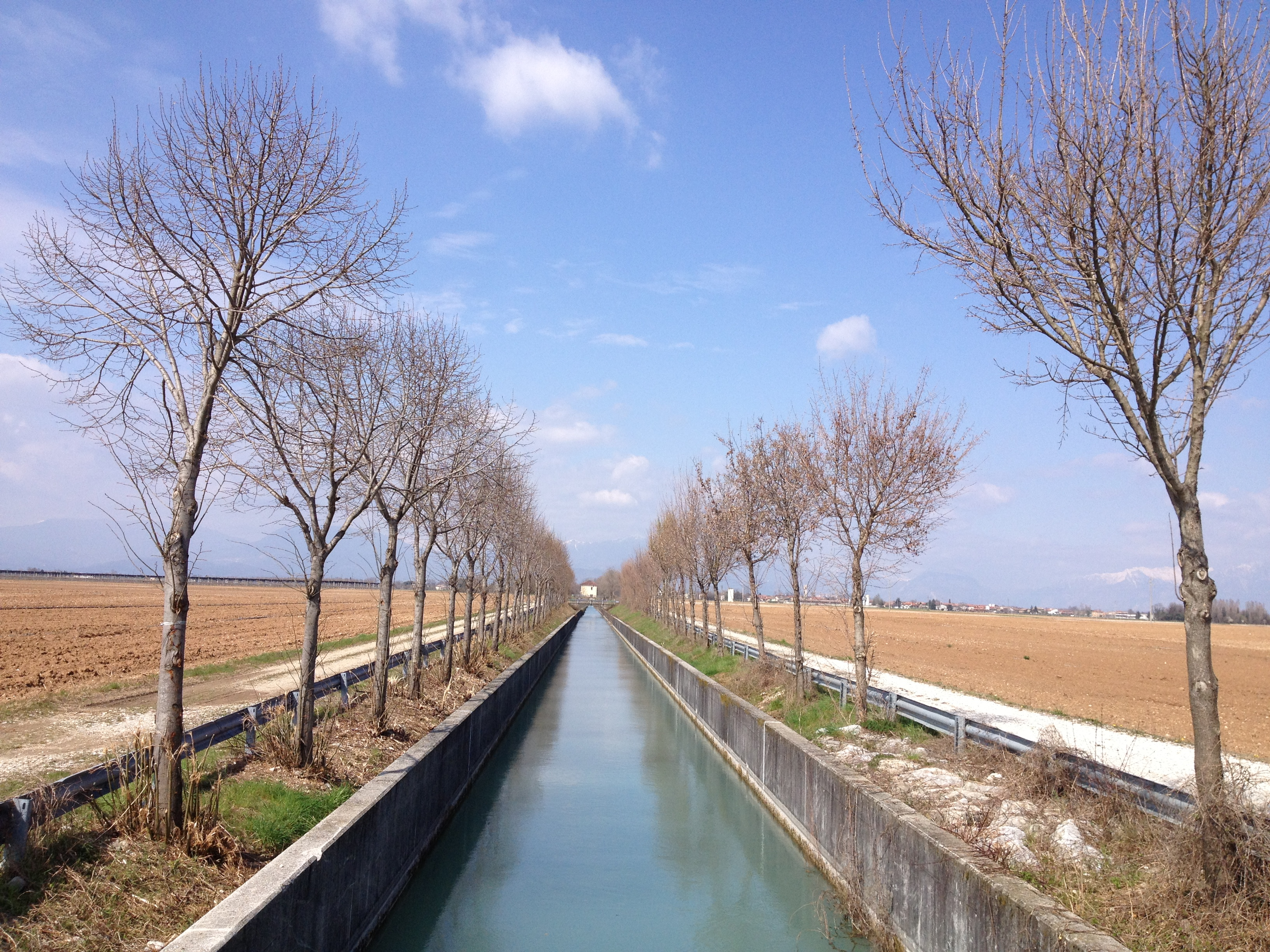 Foto di F. Curridor. Flaibano, vista sul canale Giavons verso Nord